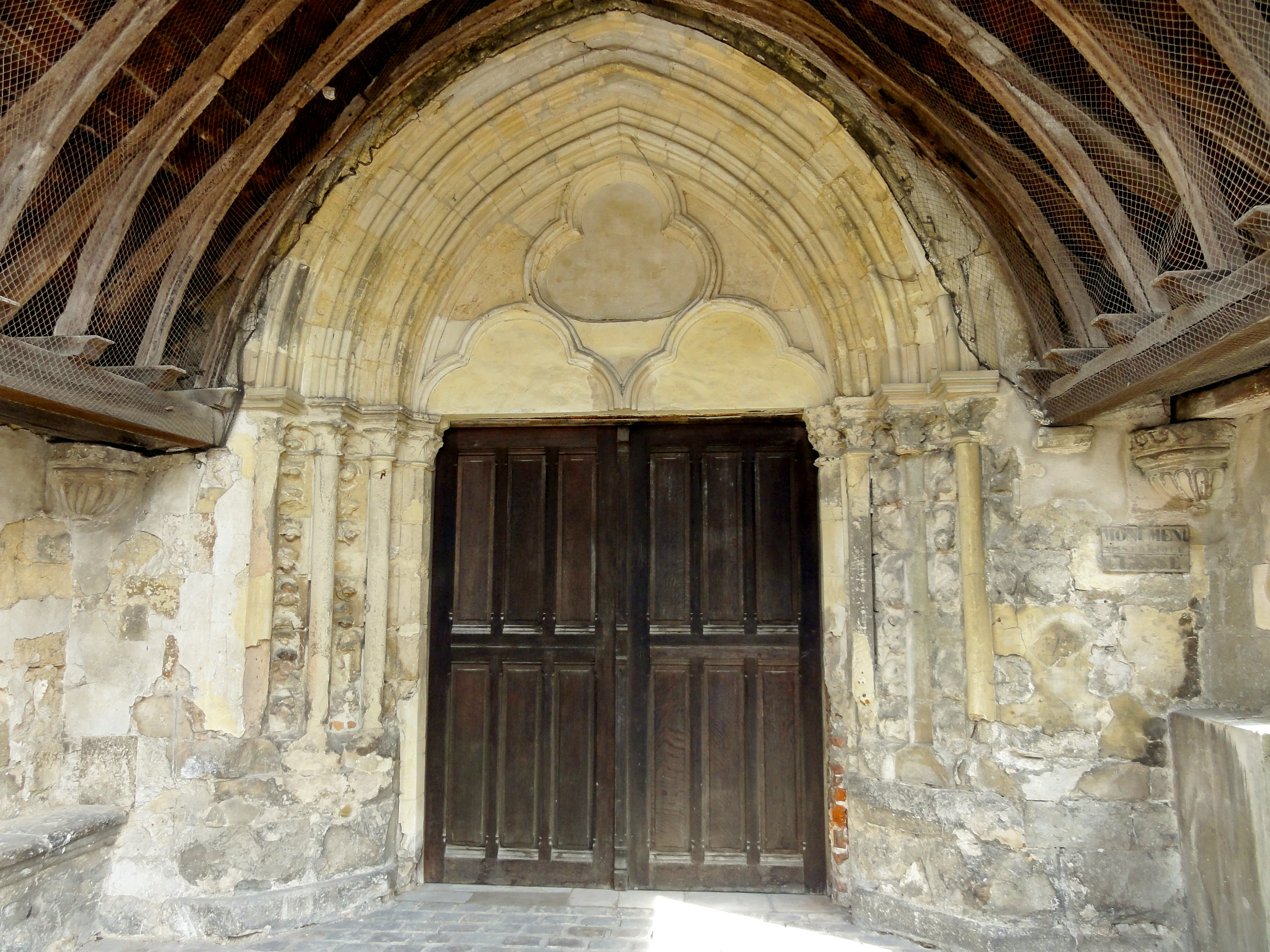 Portail principal sous le porche.